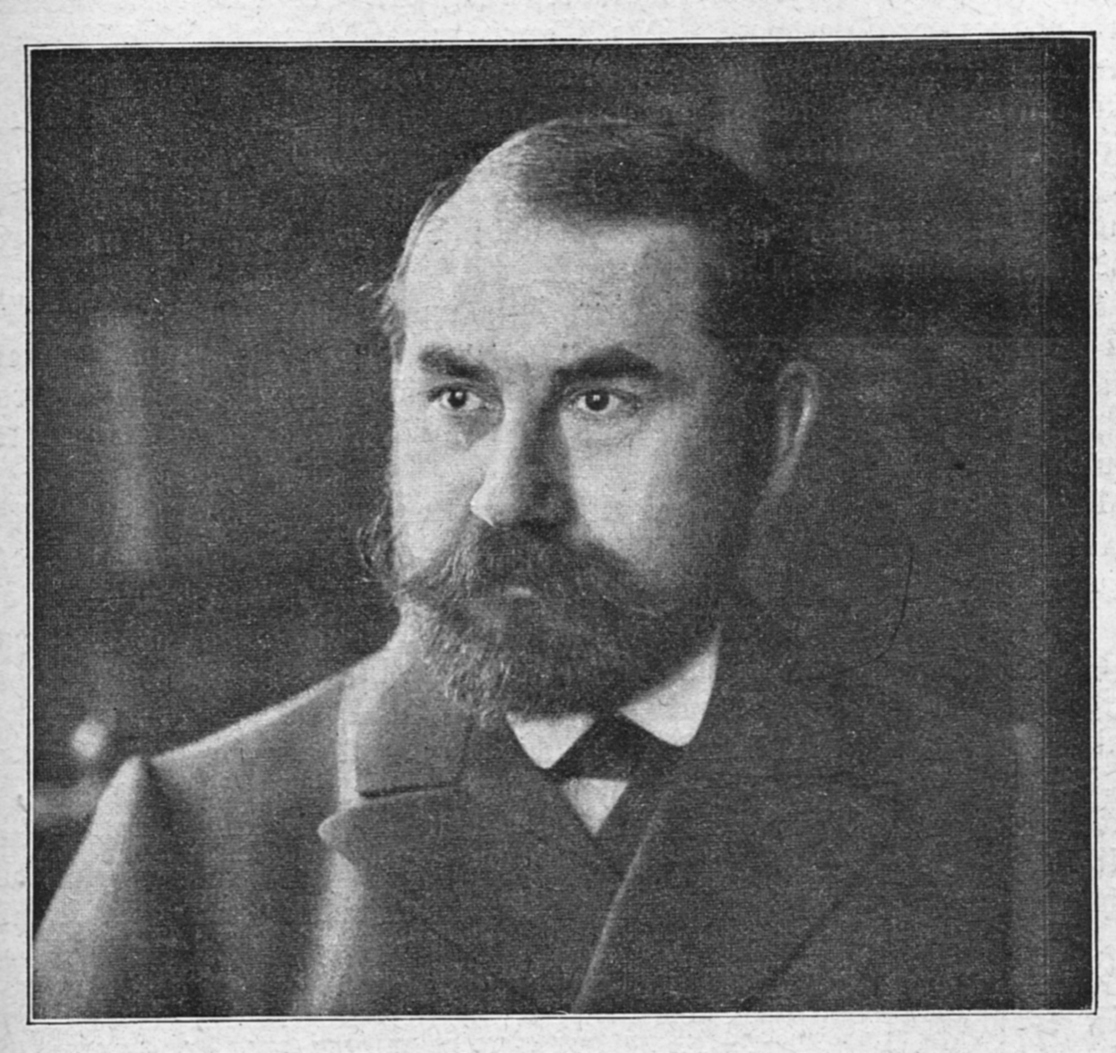 Porträt Johannes Schlaf